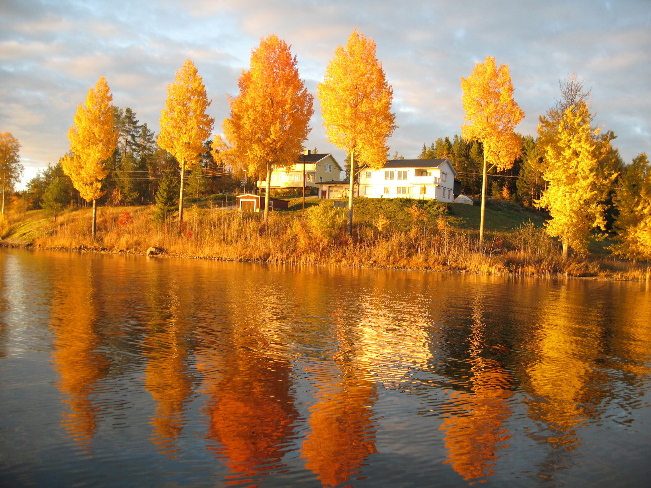 Billsjösjön i höstfärger